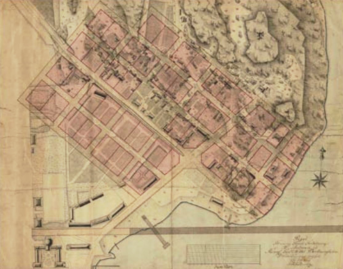 Plan av rutnätstyp lagd över Drottningholmsmalmen. Karta upprättad 1783 av L.R. Kökeritz. Lantmäteriverket, Stockholm .